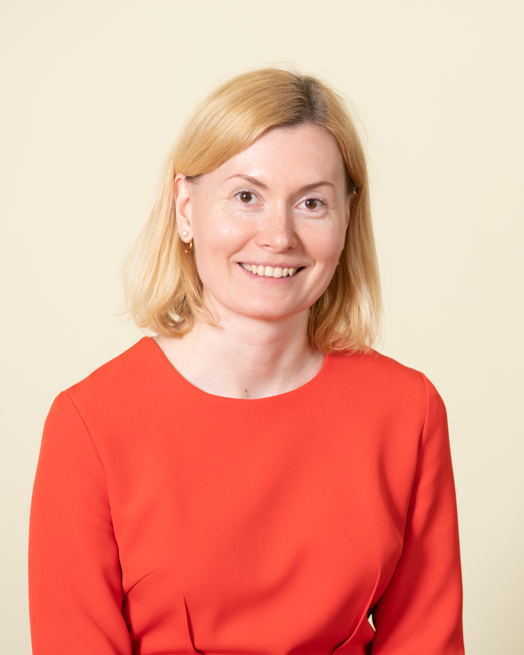 Riina Sikkut